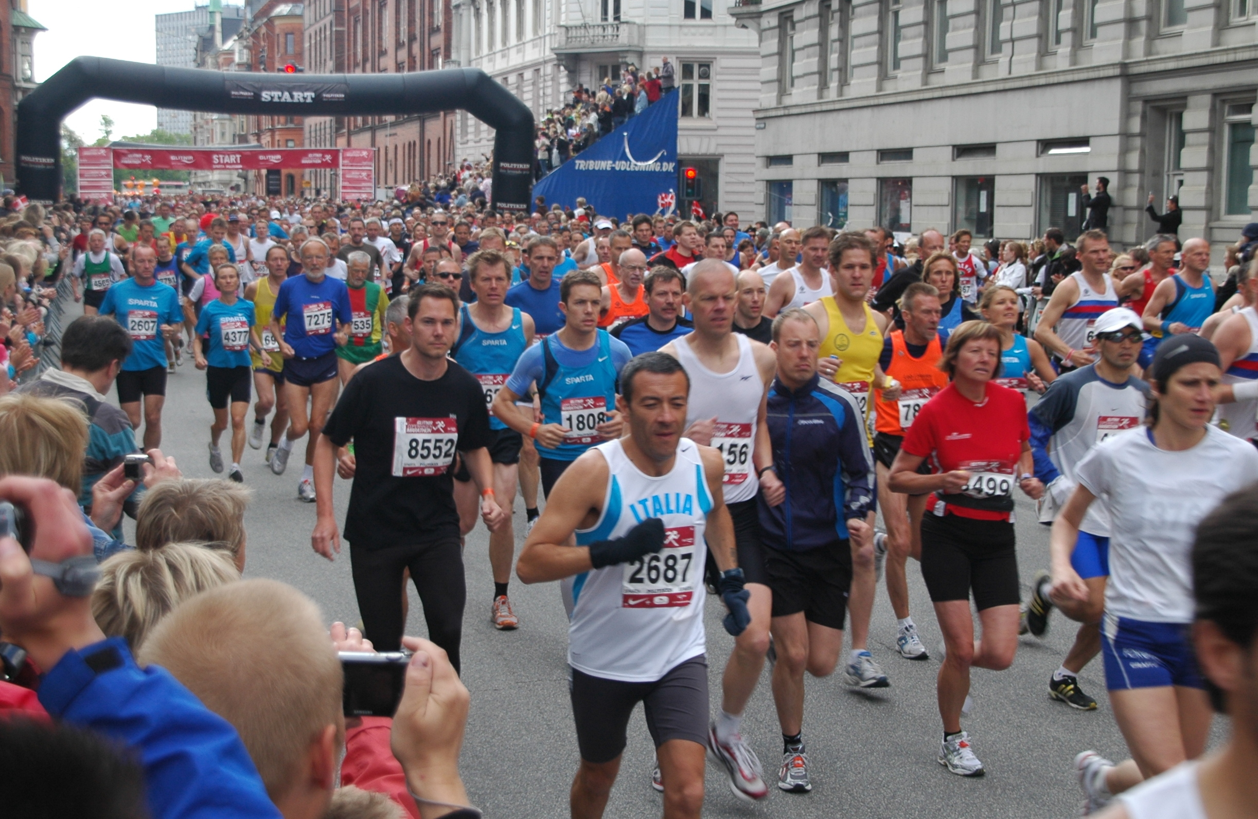 Start!